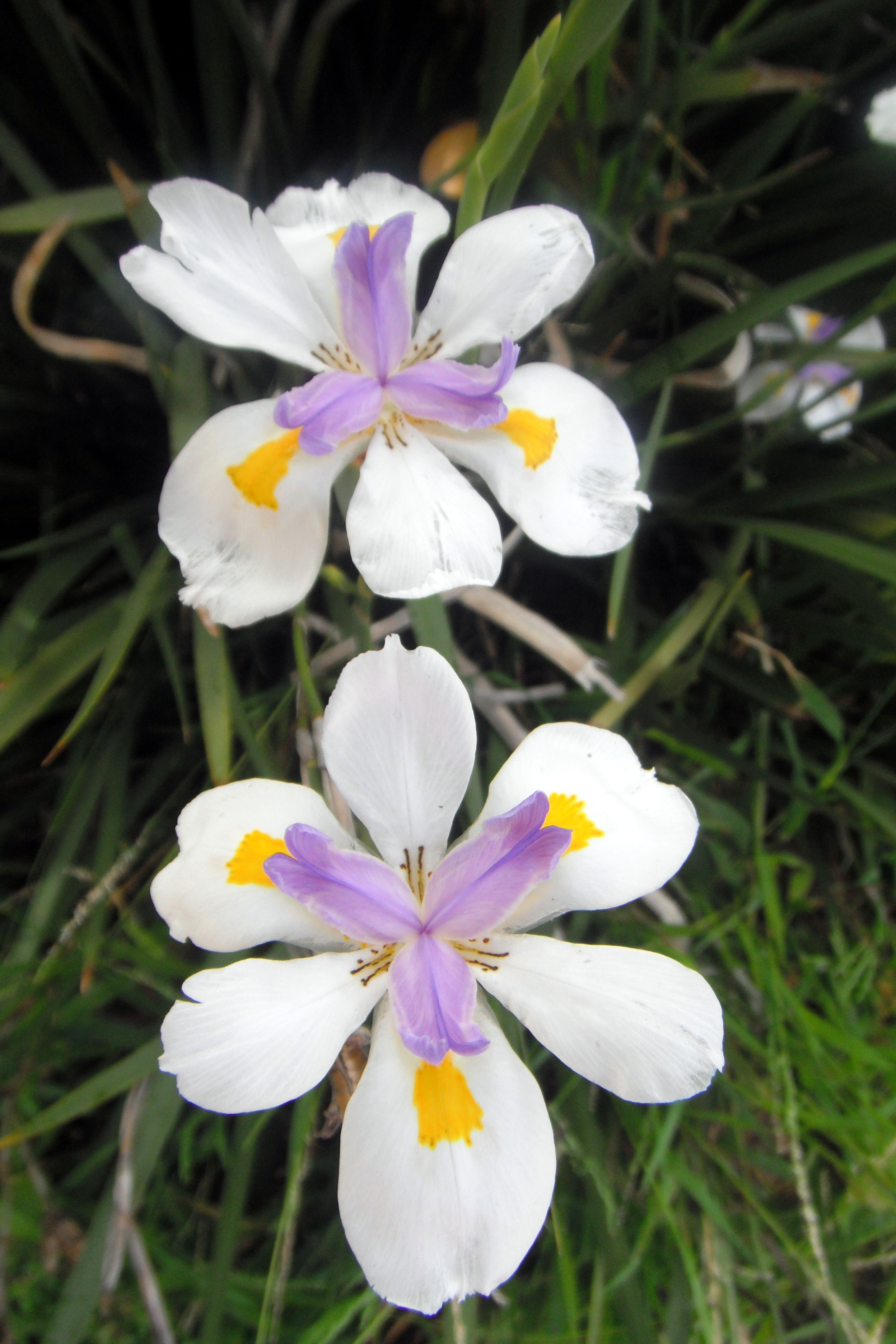 Unidentified flowers Sydney